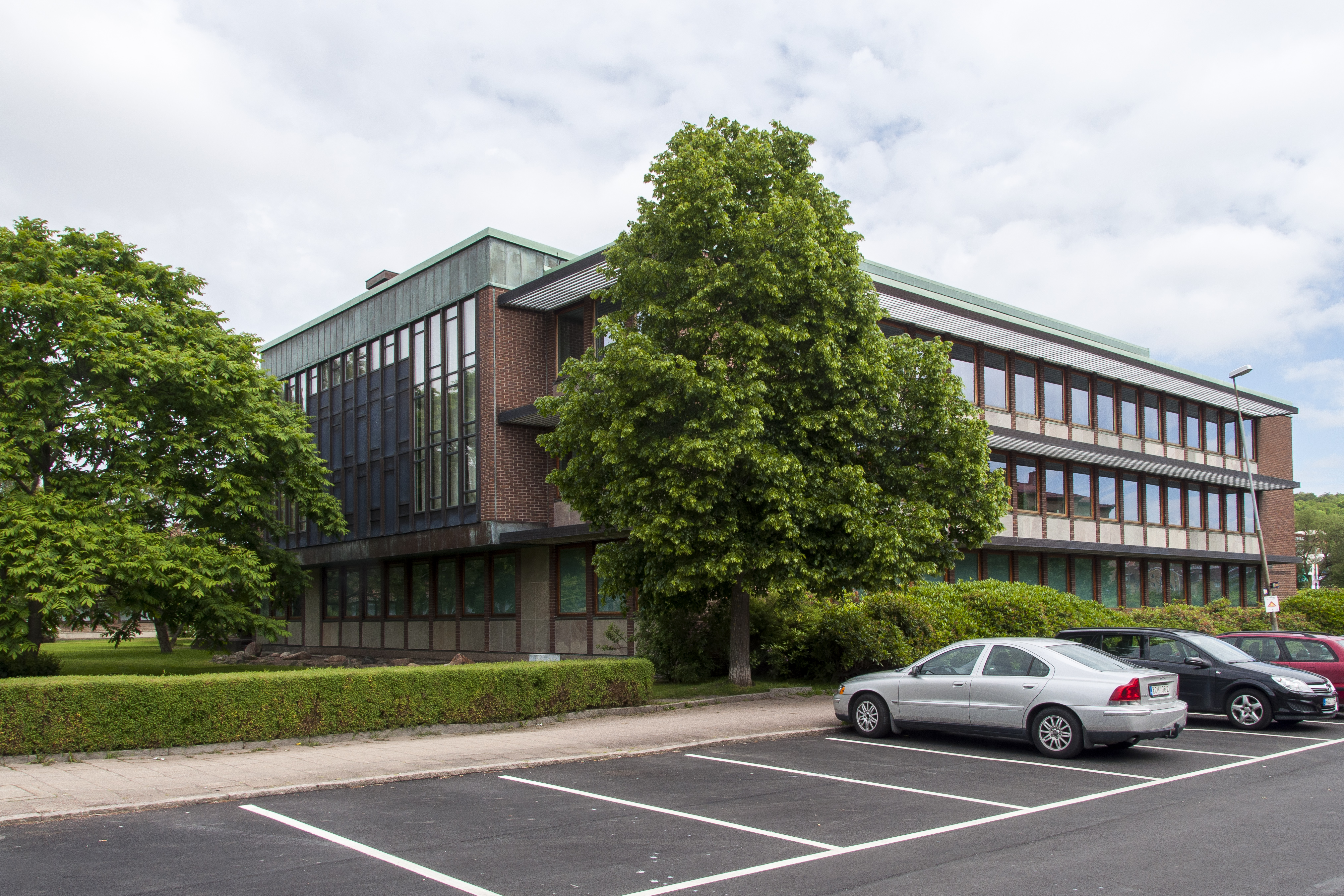 Mölndals stadshus, baksida. Byggnadsår 1956-1960. Arkitekter Gösta Edberg & Åke Ahlström